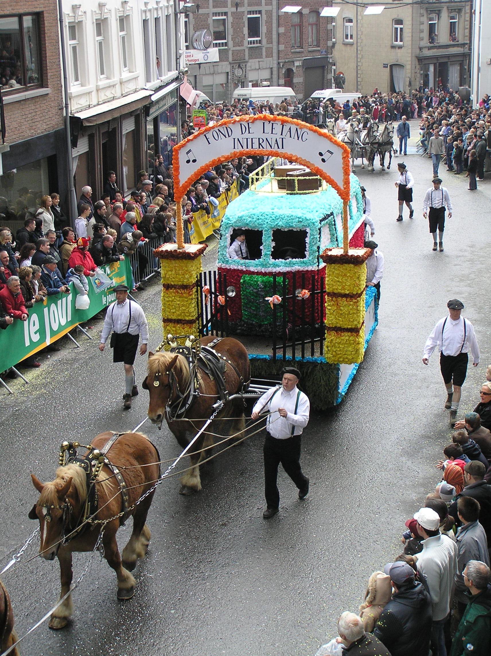 Cavalcade 2006 - Herve - Attelage